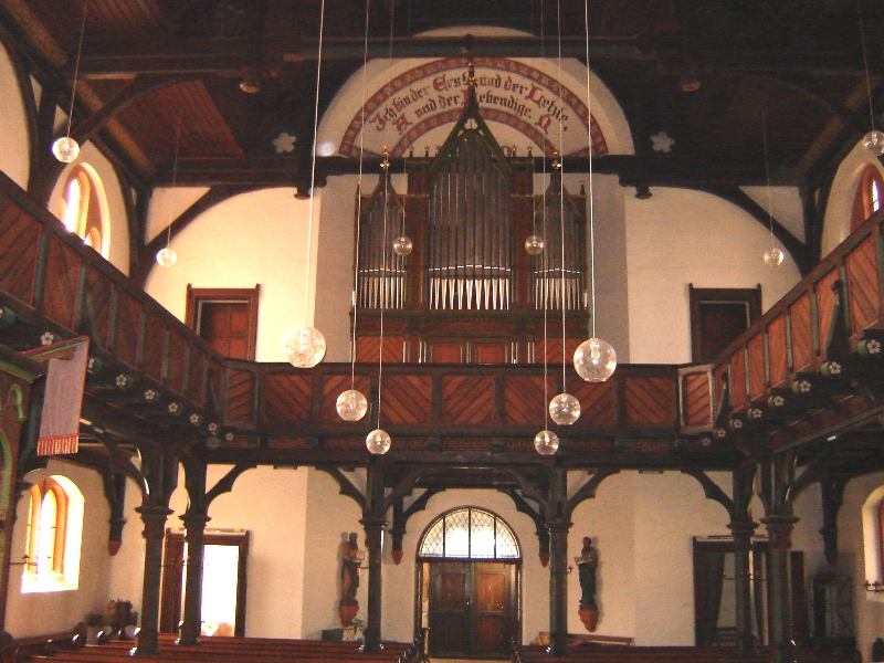 Kirche Parchau (Burg), Sachsen-Anhalt, innen nach Westen